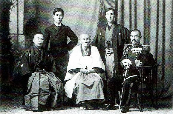 野辺地尚義（前列中央）、山屋他人（前列右）。